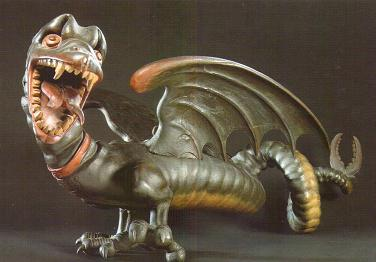 Statue e bois de la Grand'Goule par le sculpteur Jean Cargot.